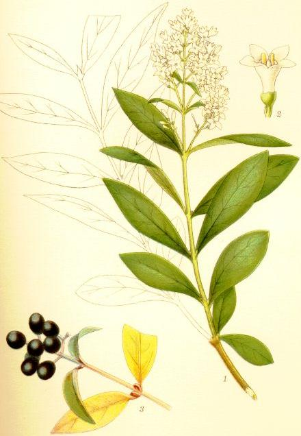 Liguster (Ligustrum vulgare) blommande gren (i juli), lomma (4/1), ruktställning med höstlöv (november)